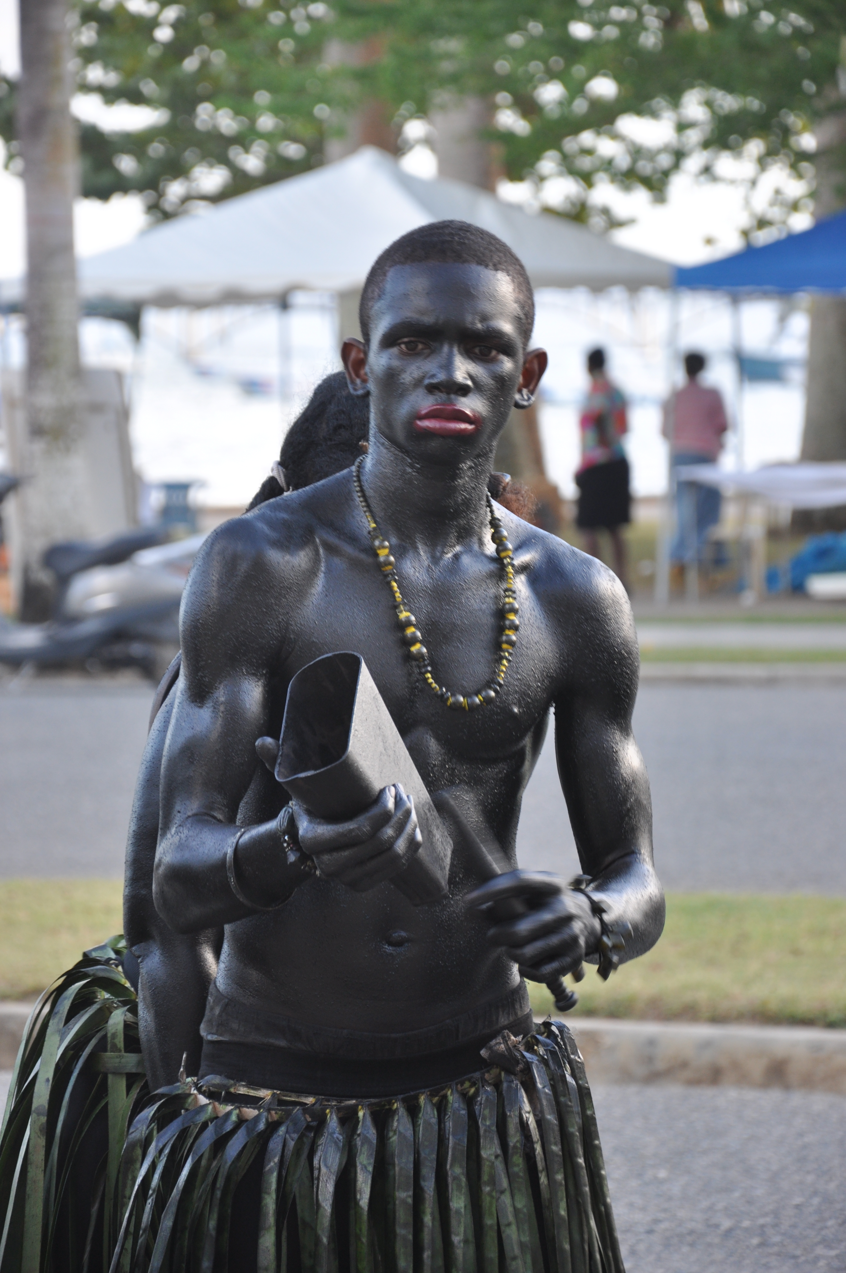 Carnaval de Février 2011 à Samana (République dominicaine)